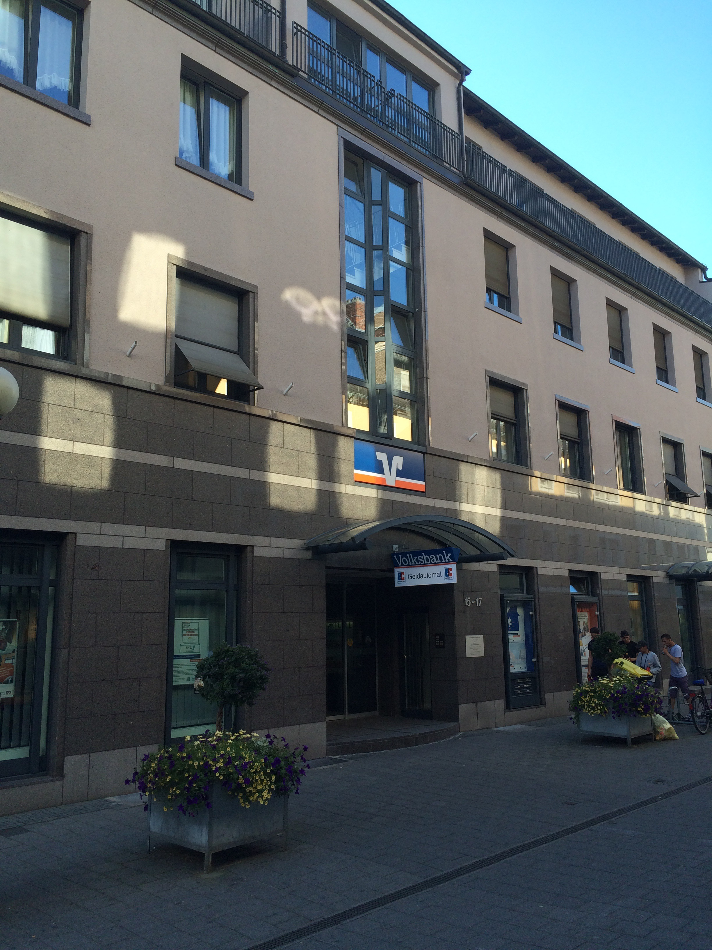 Rüsselheimer Volksbank